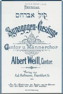 Titelblatt des Buches von Albert Weill: Synagogen-Gesänge für Cantor und Männerchor, Frankfurt am Main 1892